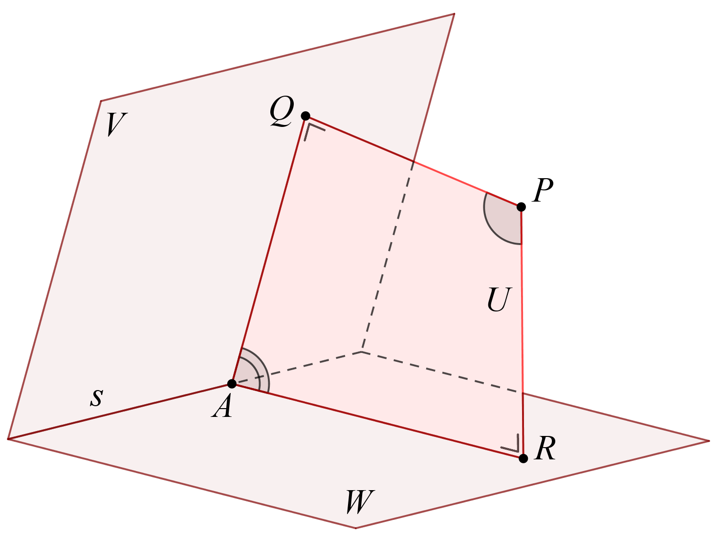 Tweevlakshoek - normalen